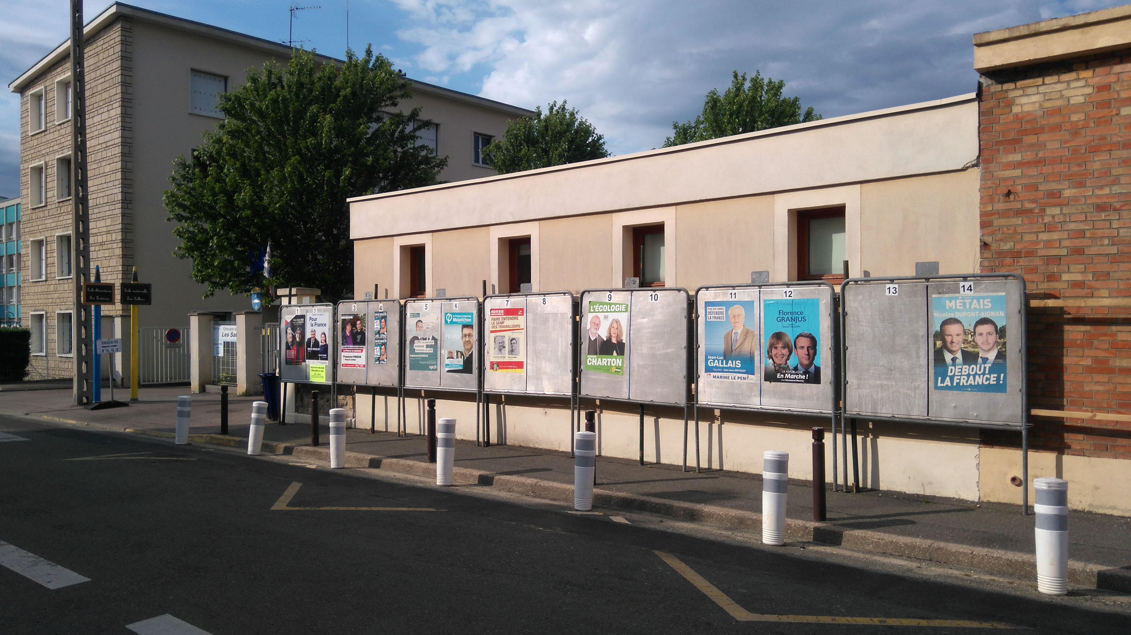 Affiches législatives du premier tour des élections législatives dans la 12e circonscription des Yvelines à Poissy rue Georges Constanti.